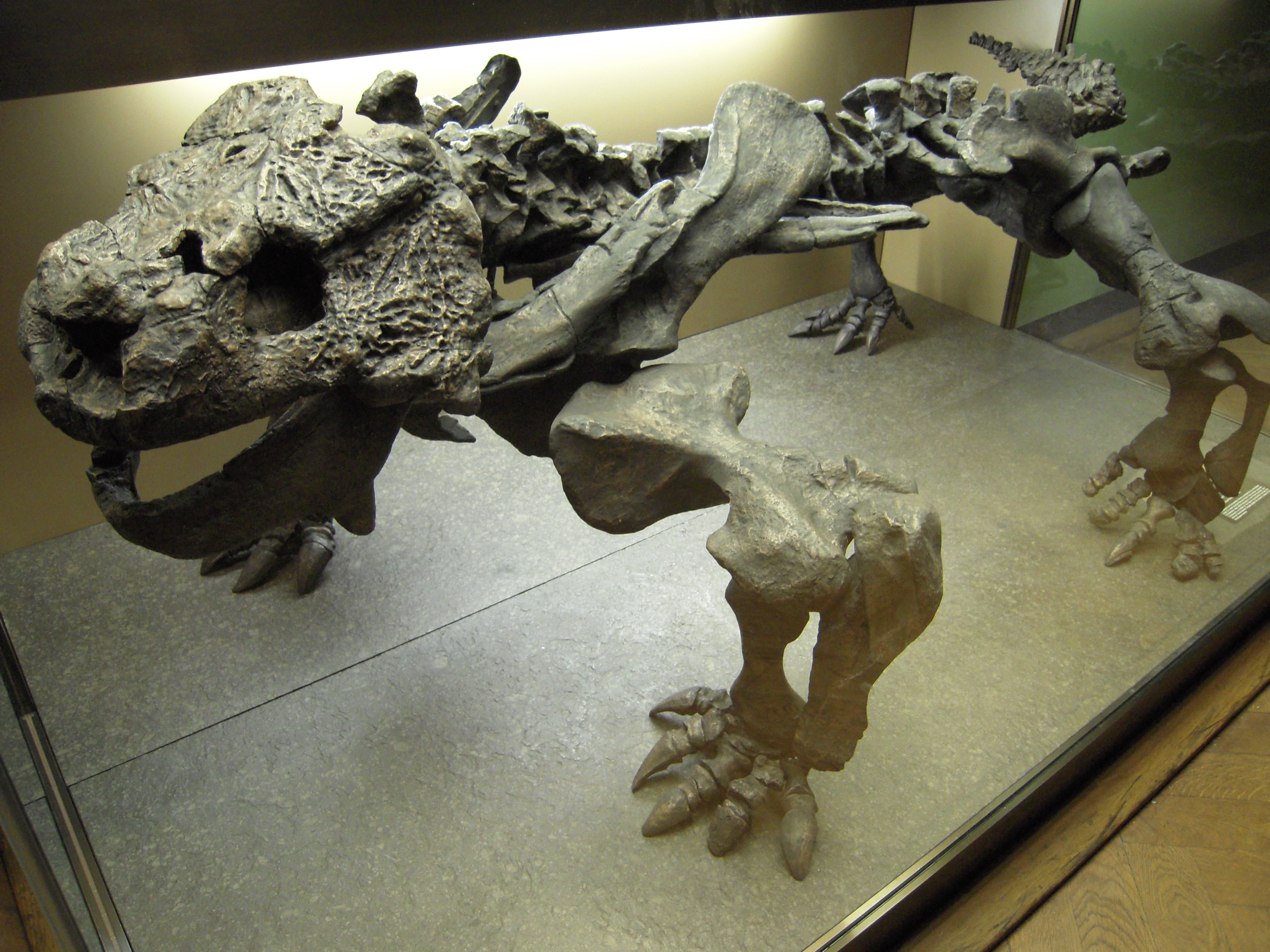 Skelettrekonstruktion von Bradysaurus im Naturhistorischen Museum Wien